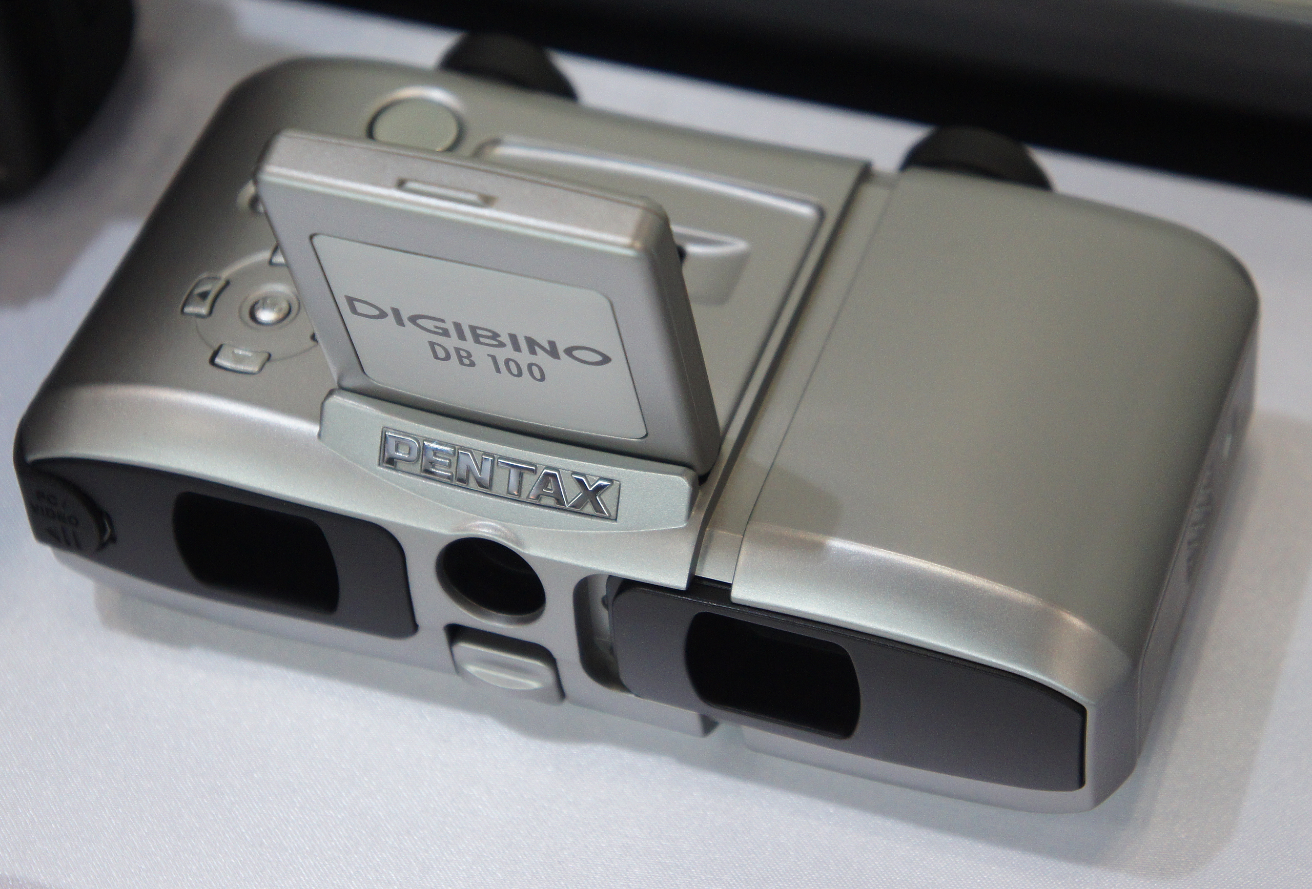 CP+ 2011: 2002 Pentax Digibino DB100